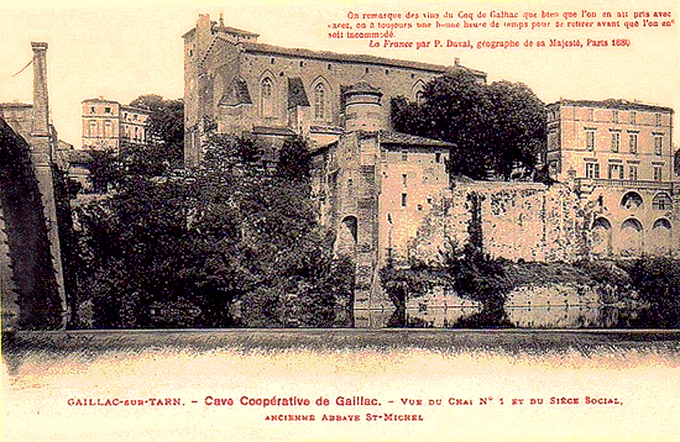 Abbaye Saint-Michel de Gaillac, premier siège social de la Cave coopérative